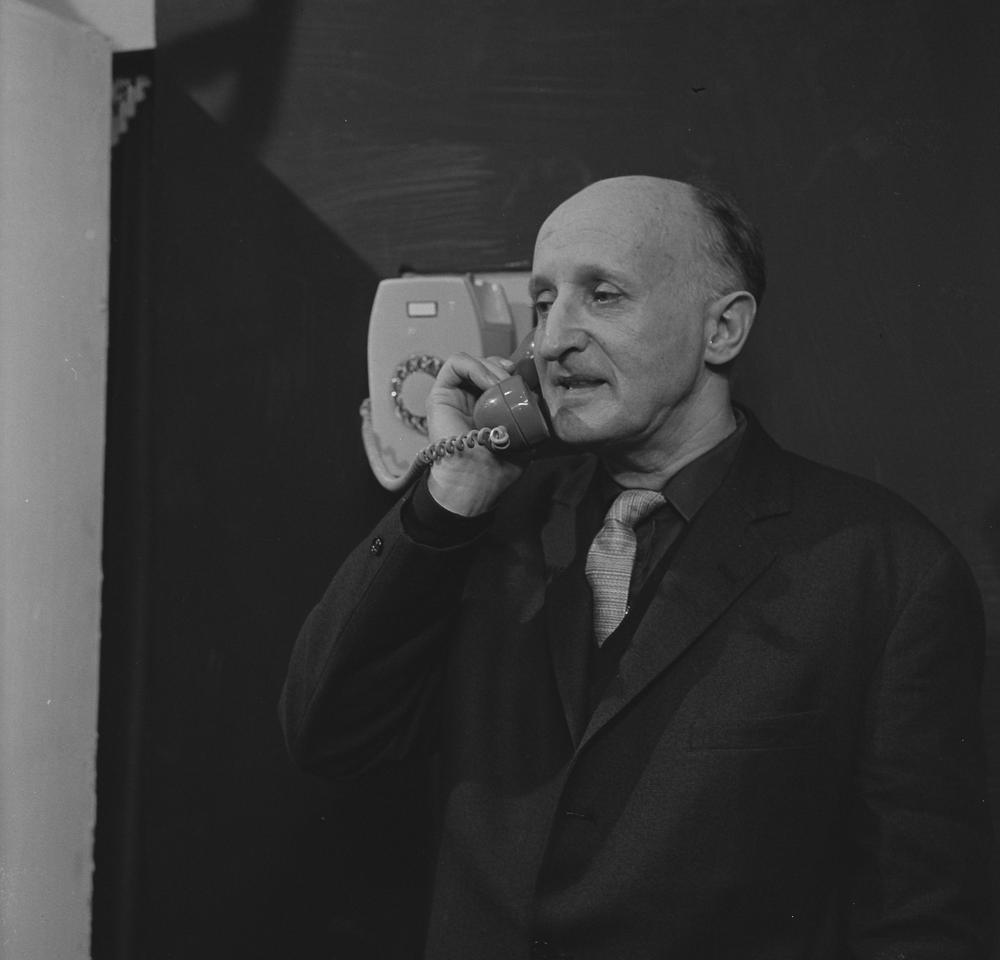 Dick Swidde als Buurman Boordevol tijdens de opnamen van Ja zuster, nee zuster.